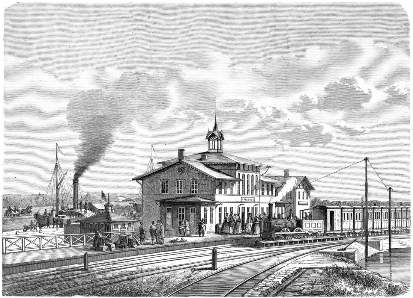 Töreborda station